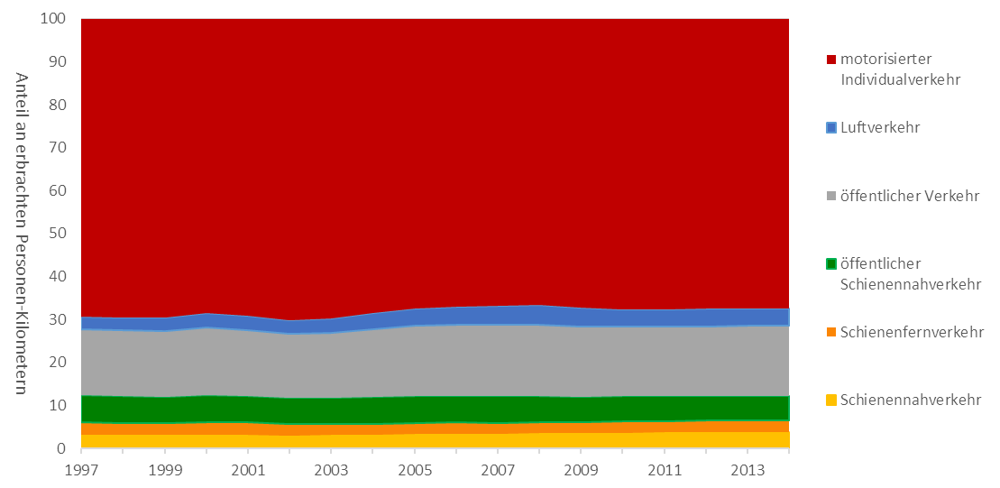 Das Bild zeigt die prozentuale Verteilung der Verkehrsleistung (in Personen-Kilometer) auf die verschiedenen Verkehrsträger in Deutschland. Sie basiert auf Daten aus dem Report "Verkehr in Zahlen 2015/2016" des BMVI. Die Daten für 2014 sind "teilweise vorläufig".